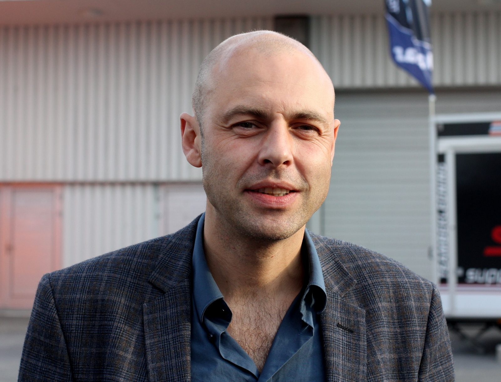 Christian Fredrik Martin i forbindelse med førpremieren på filmen Pioner på ONS Norway 2013